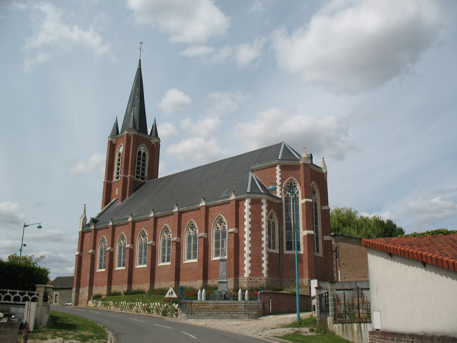 Vue de l'église néo-gothique de Coisy, montrant les baies du côté sud.